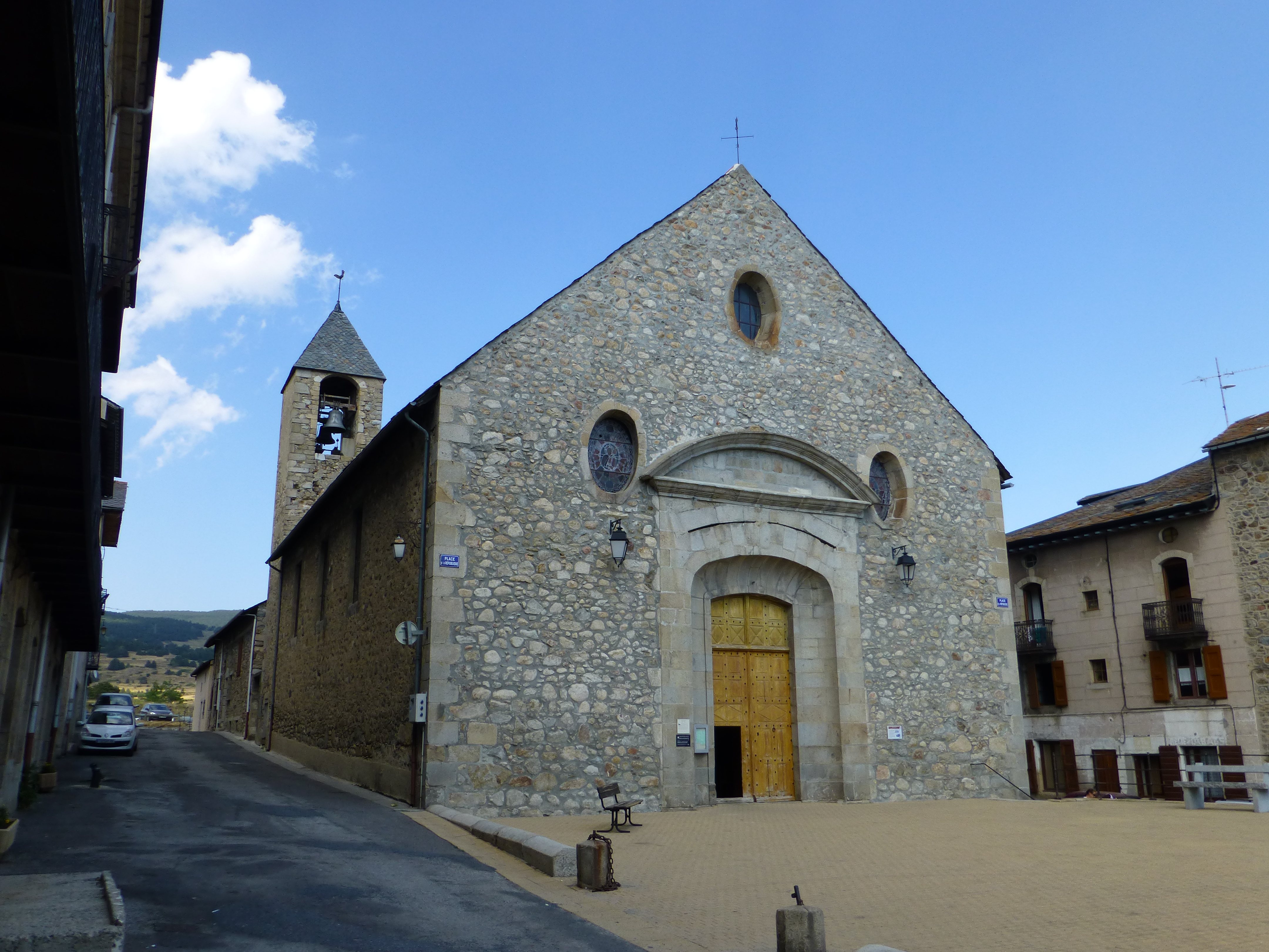 Église Saint-Louis de Mont-Louis (Inscrit) .